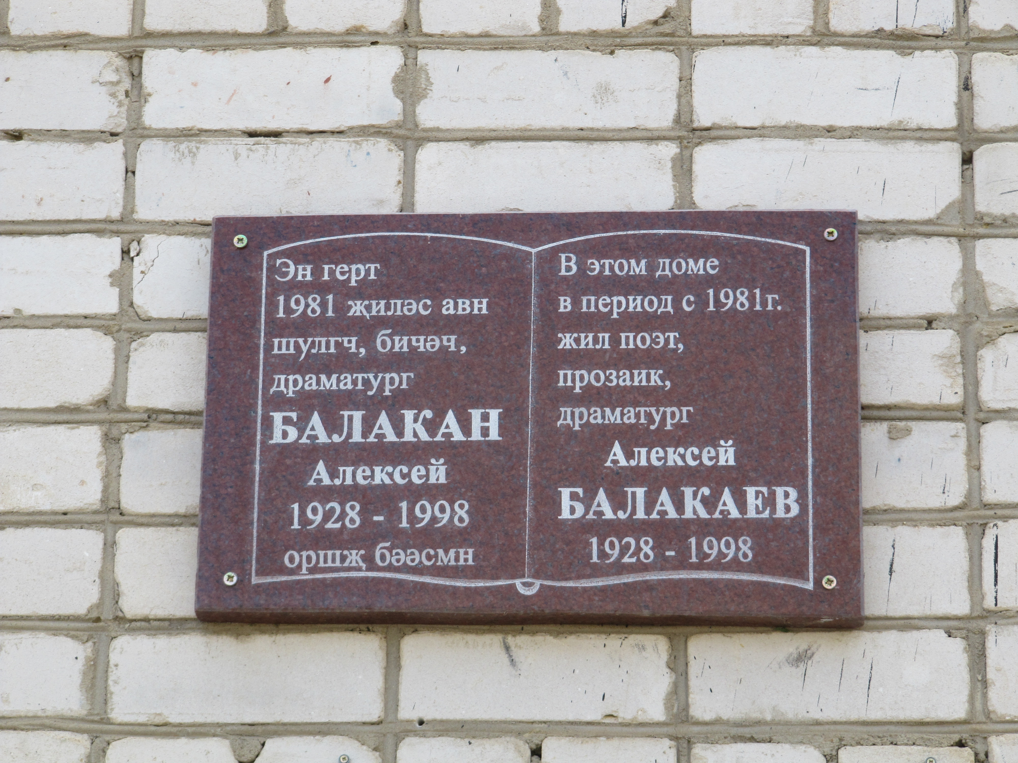 Мемориальная доска, посвящённая калмыкому писателю Алексею Балакаеву